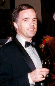 Bär von Randow